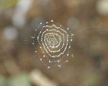 male stabilimentum of Octonoba tanakai from Okinawa.